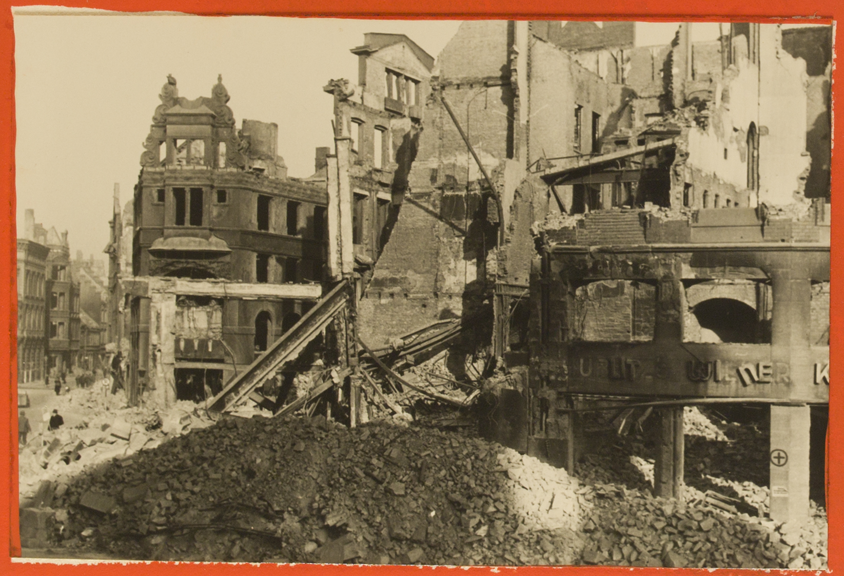 Nach den Luftangriffen auf Hannover im Zweiten Weltkrieg bot sich den Überlebenden 1945 am Kröpcke ein Bild der Verwüstung. Hier eine Aufnahme am Kröpcke Ecke Bahnhofstraße und Georgstraße auf die Ruine vom Haus Heinemann, wo später das Kaufhaus Magis. Auf dem Bild ist unten rechts am Gebäudepfeiler ein Kreis mit einem schwarzen Kreuz zu sehen, das Zeichen für "Das Haus wurde auf Leichen durchsucht". Im Hintergrund ist das Haus Bahlsen an der Ecke Andreaestraße zu sehen, in dessen Erdgeschoss das Kamerahaus von Photo Lill untergebracht war. Heute findet sich dort das Schuhhaus Gisy ...